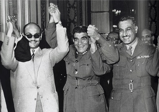 صلاح سالم مع محمد نجيب وجمال عبدالناصر.